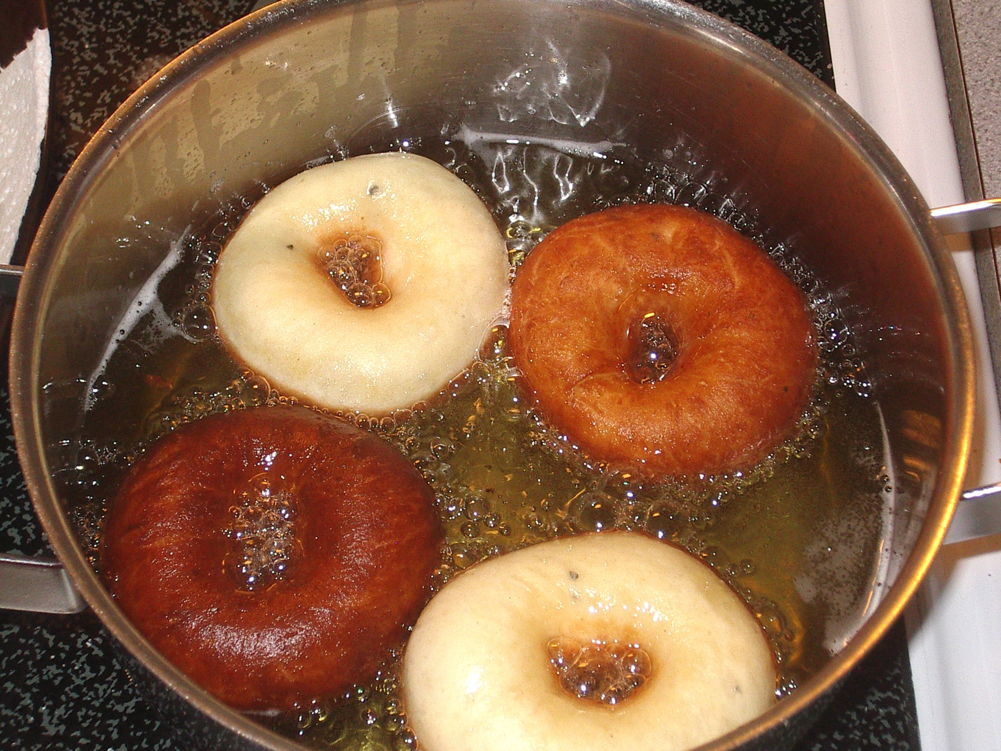 Munkkeja (Finnish for doughnuts) being deep fried.